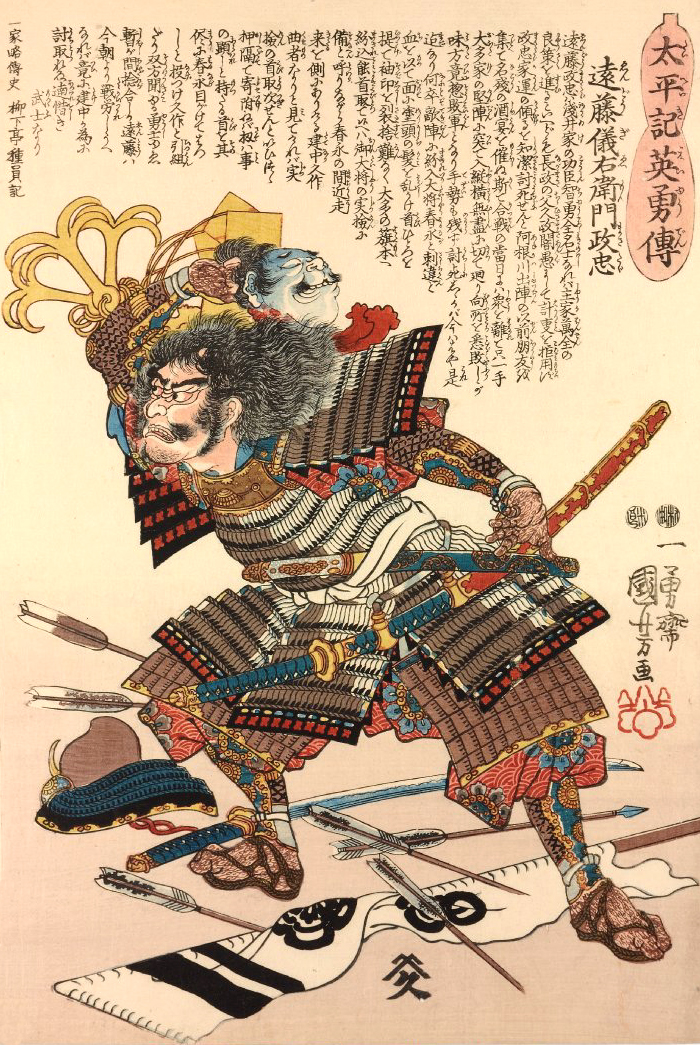 「太平記英勇傳 ・遠藤儀右衛門政忠（遠藤直経）」